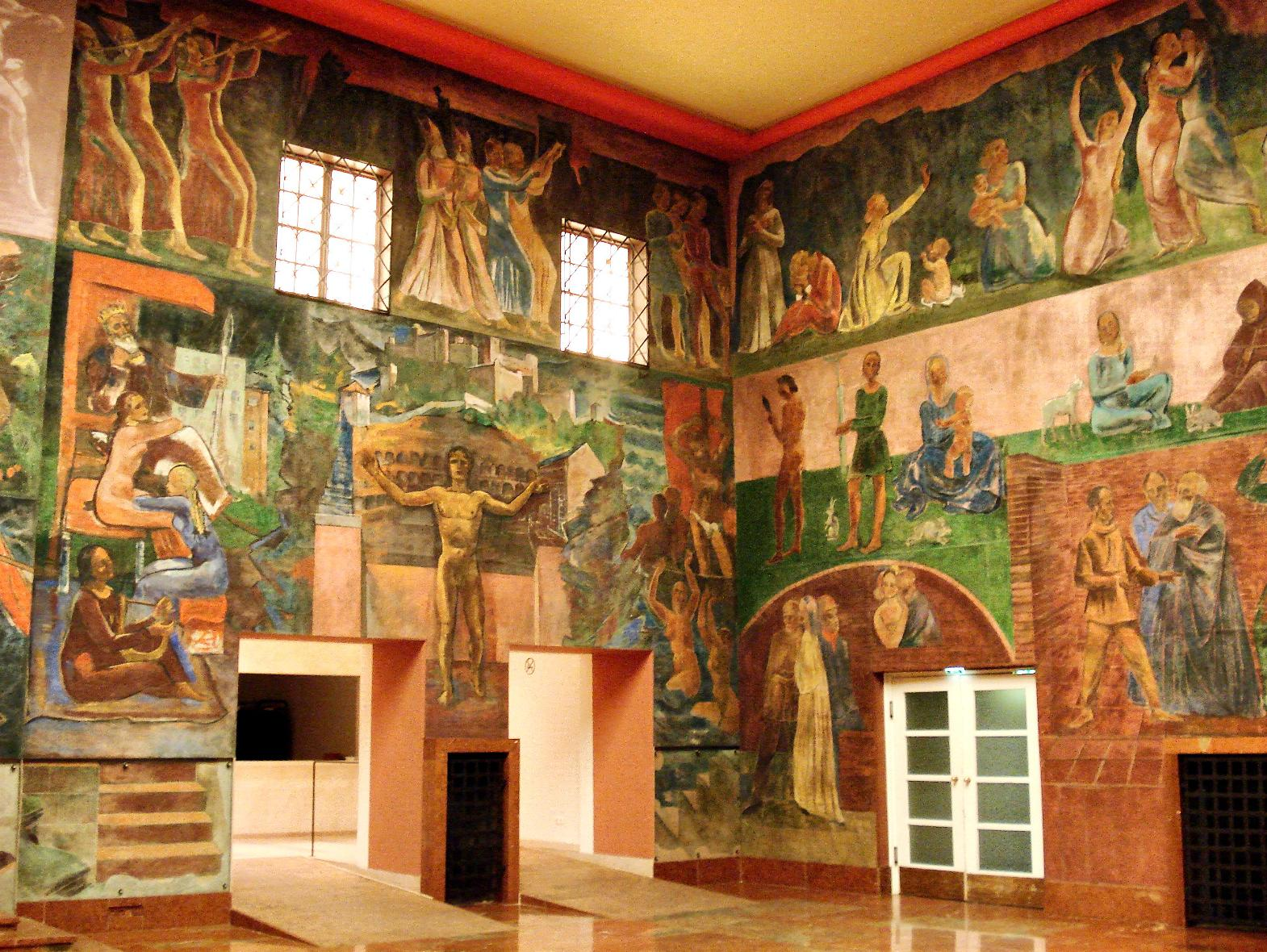 Foyer und Bühnenhaus des Kleinen Festspielhauses sowie Winterreitschule